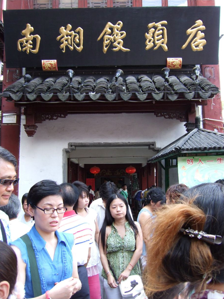 人多到不像話之『南翔包子;店』